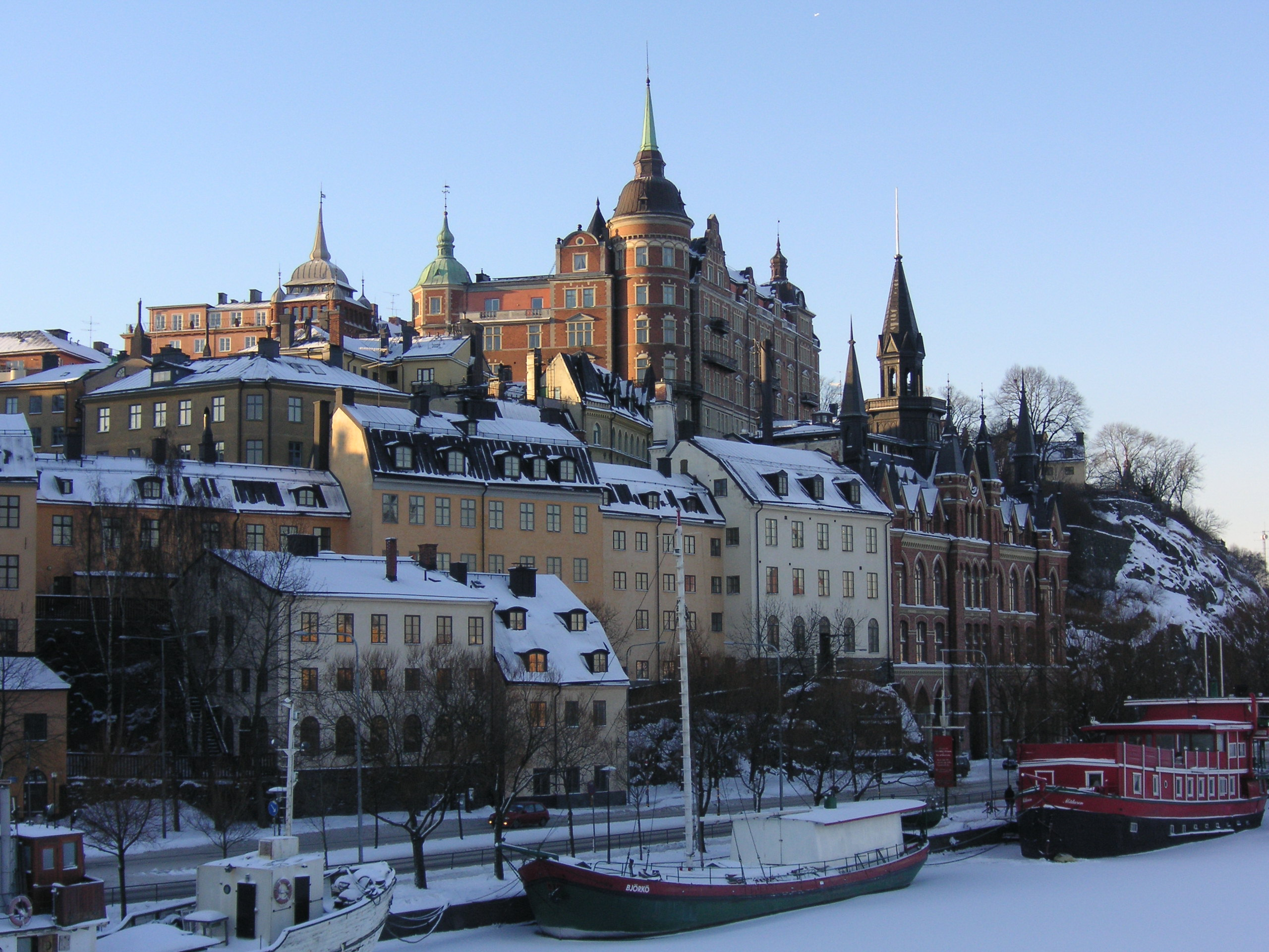 Söder Mälarstrand på Södermalm i Stockholm, mitt i bild syns Laurinska huset, Bellmansgatan 4-6, byggt år 1891 - 92.